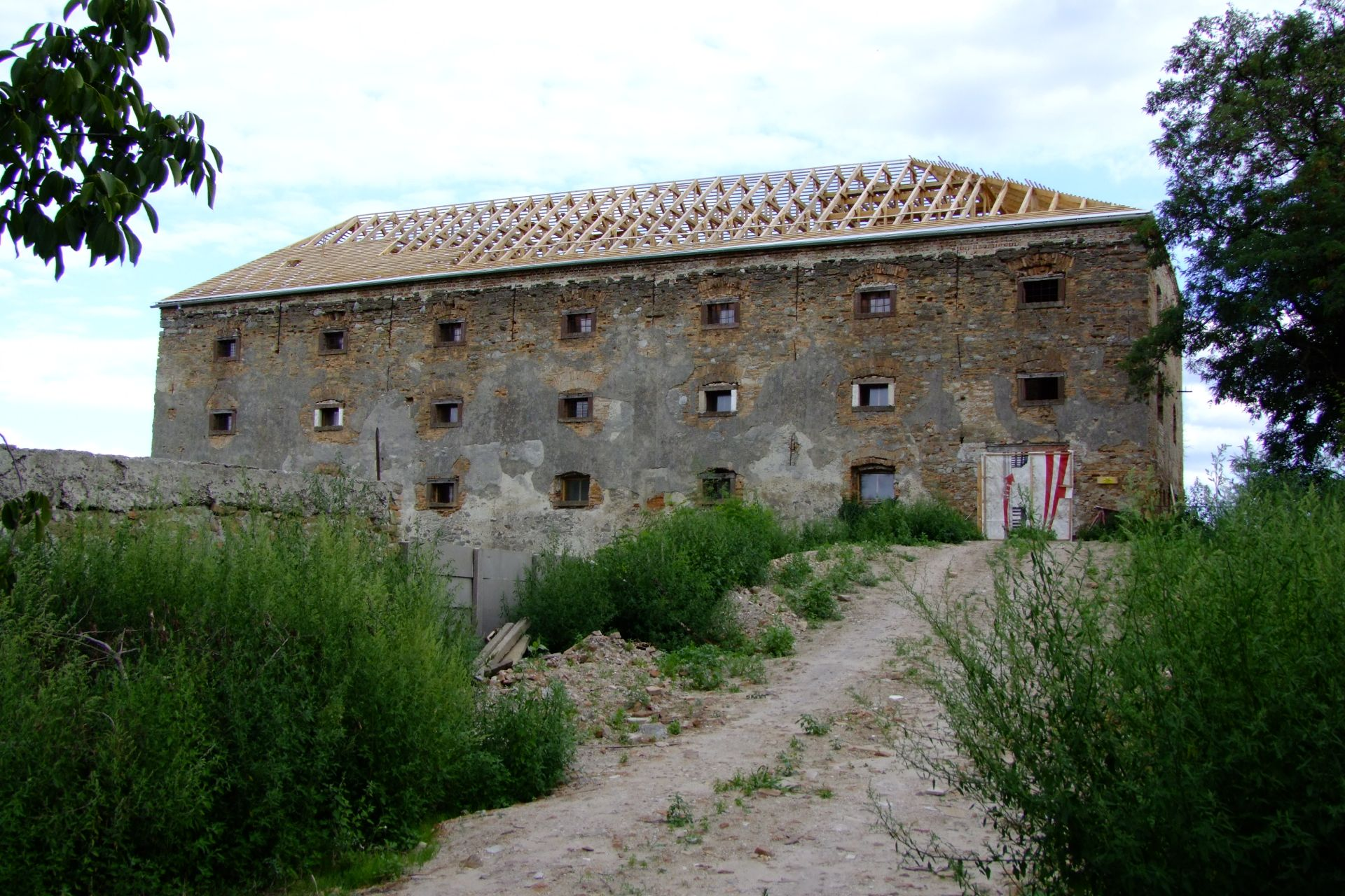 Altes Schloss in Kittsee. Die ehemalige Wasserburg an einer alten Donauschlinge kann bis ins 12. Jh. zurückverfolgt werden; der dreigeschossige Vierflügelbau mit einem rechteckigen Hof wurde vermutlich unter den letzten Arpaden als Grenzfestung gegen Österreich erbaut. Vom Schlossneubau im 16. und 17. Jahrhundert sind einige Relikte erhalten; eine Wendeltreppe mit Wappen im Hof und ein achteckiger Turm. Hinter dem Schloss liegt der gut erhaltene jüdische Friedhof.